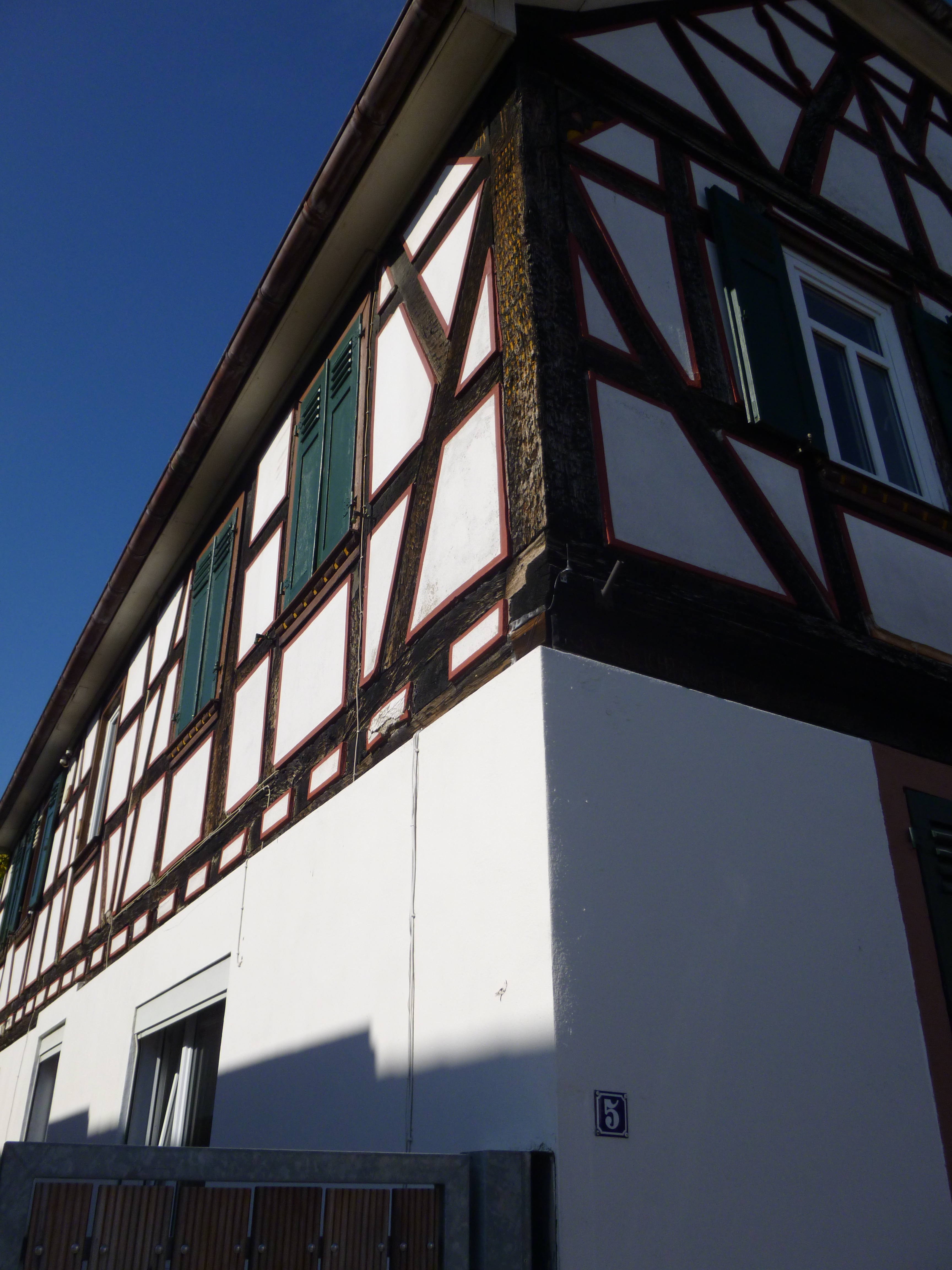 historia trabfaka domo Darmstädter Straße 5 en Darmstadt-Arheilgen, detalo